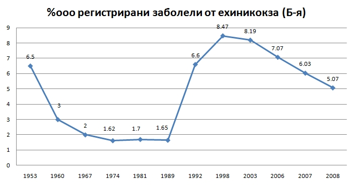 Обобщена статистика регистрирани %ооо (% на хилияда житела) заболели от ехинококоза